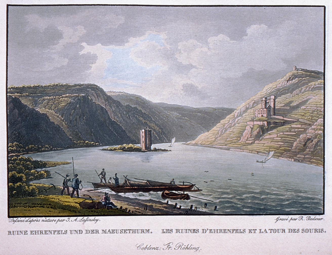 Altkolorierter Aquatintastich von R.Bodmer nach Vorlage von J.A. Lasinsky